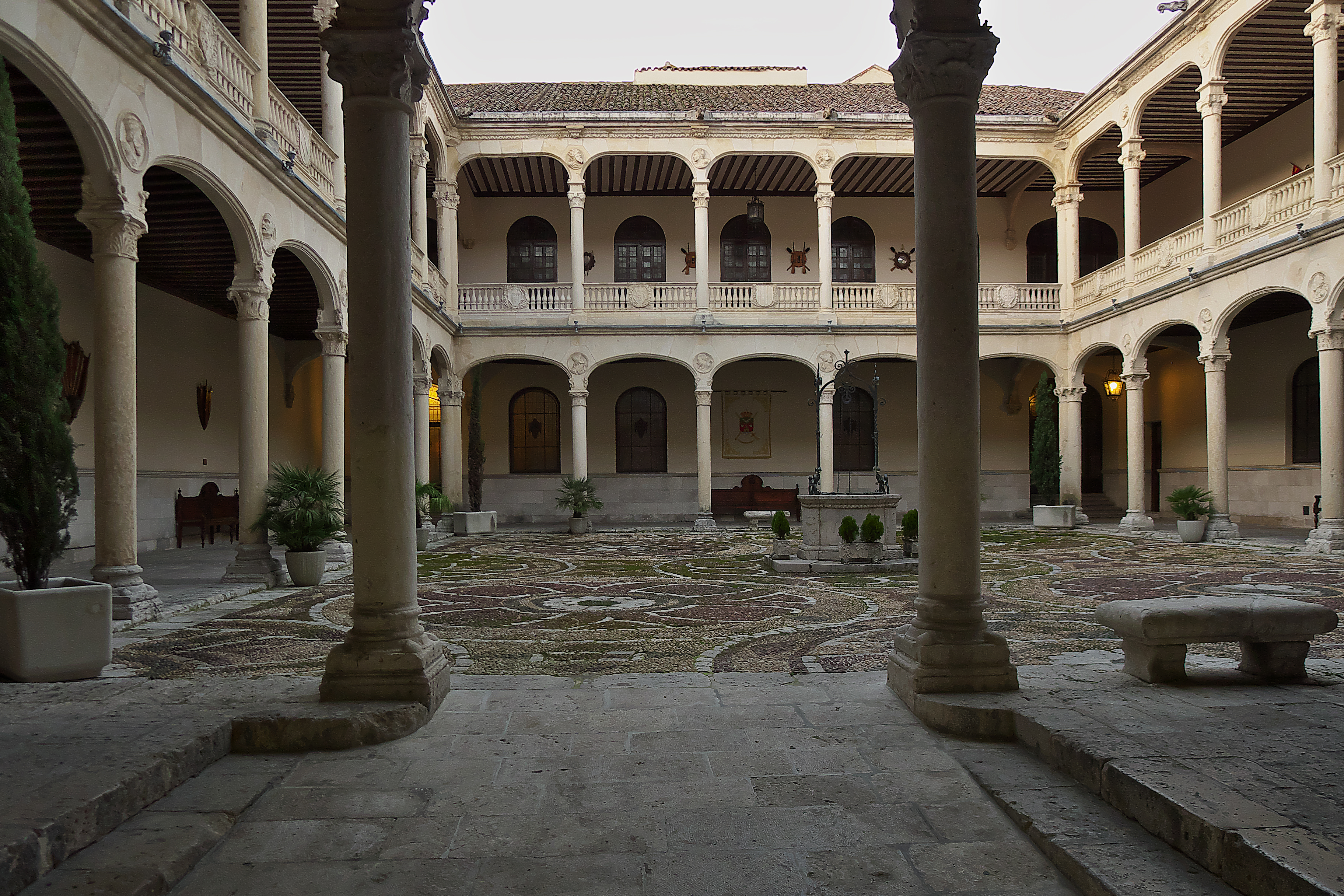 Francisco de los Cobos y Molina contrata (1524-1528) al arquitecto real Luis de Vega su palacio en Valladolid.